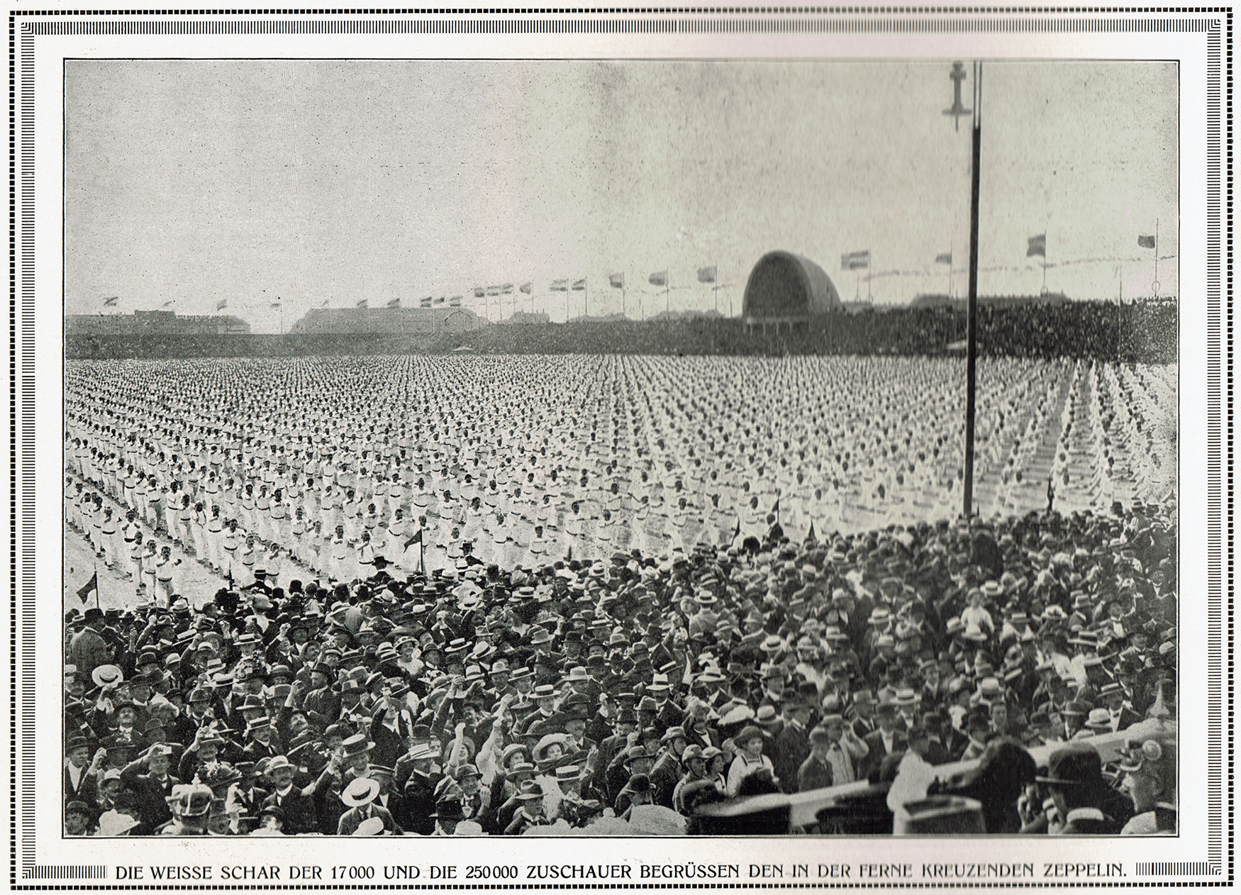 Deutsches Turnfest 1913 in Leipzig, Freiübungen